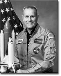 NASA Astronaut Robert Franklyn Overmyer